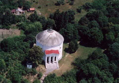 Szilvásvárad Hungary aerialphotography